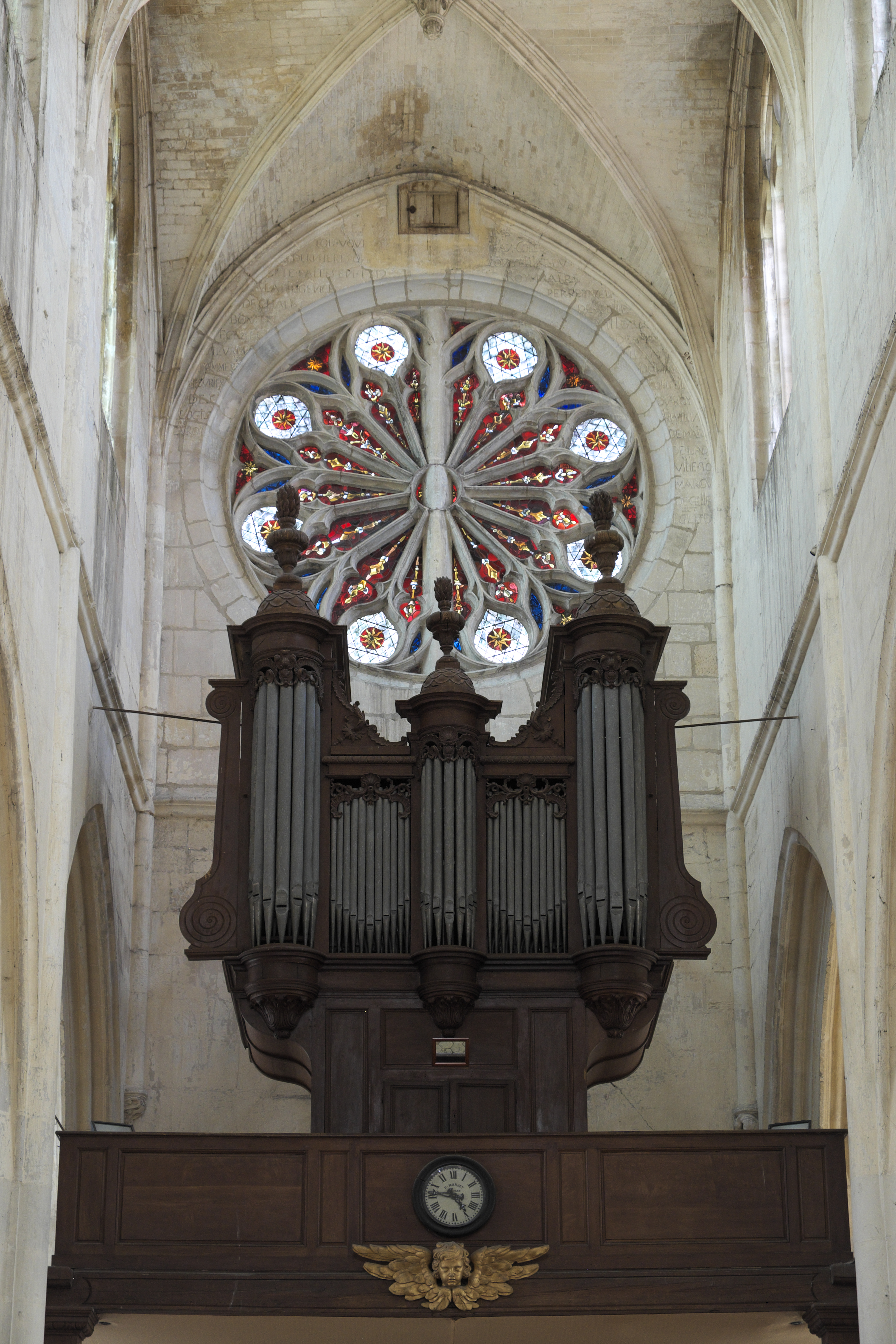 Katholische Pfarrkirche Saint-Jacques-le-Majeur et Saint-Christophe in Houdan im Département Yvelines (Île-de-France/Frankreich), Orgel von Louis-Alexandre Clicquot, zwischen 1735 und 1739 ausgeführt